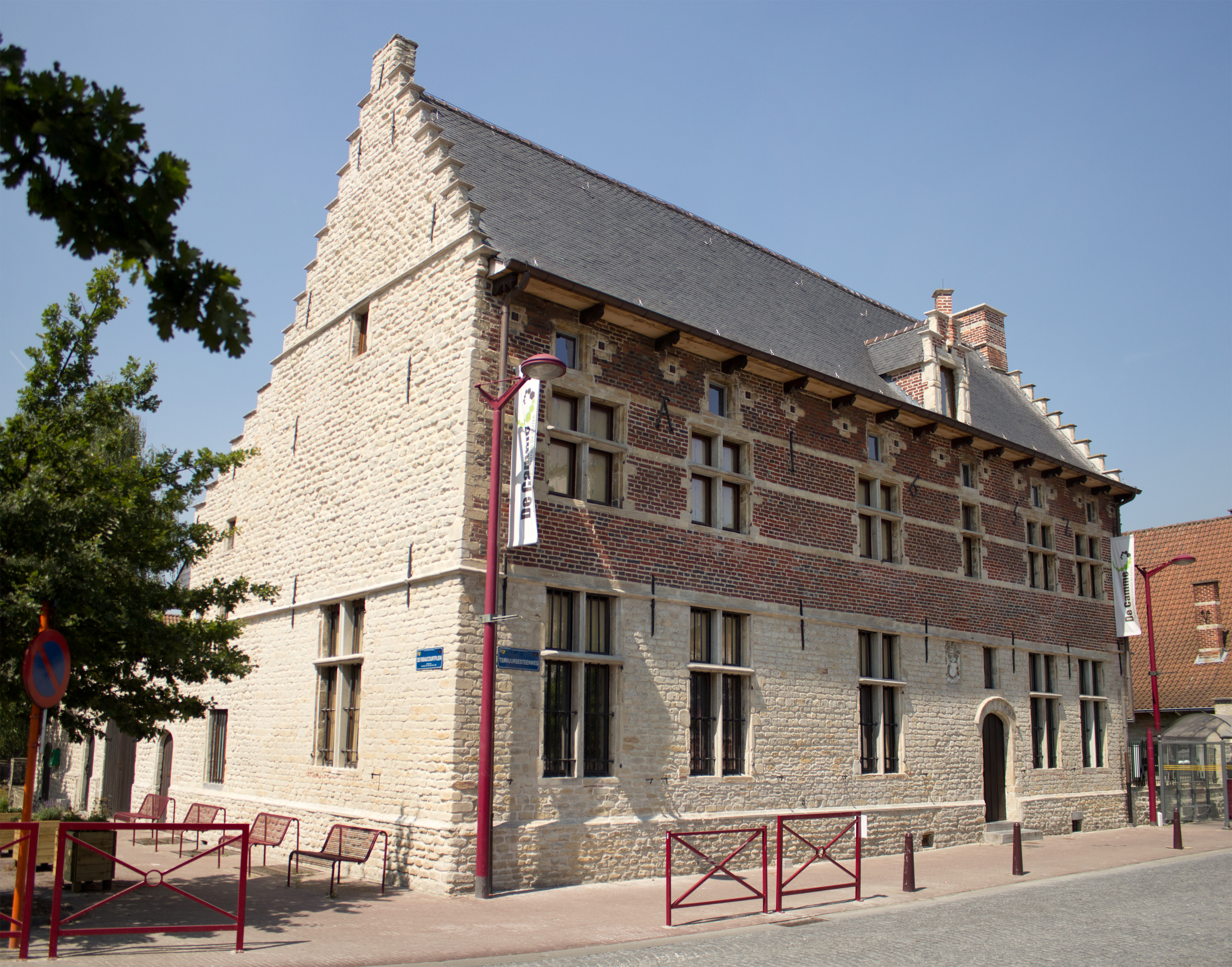 Banbrouwerij De Kam, vanaf 1927 gemeentehuis van Perk.